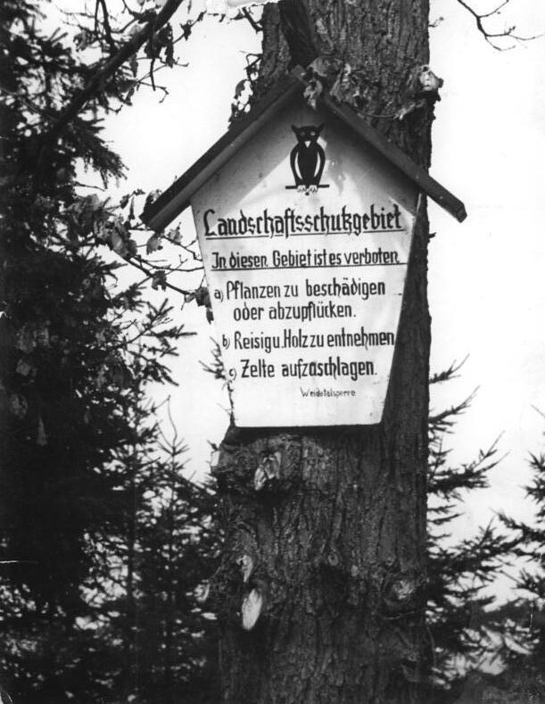 Weide-Talsperre, Hinweisschild, Landschaftsschutzgebiet Zentralbild Erfurt 30.4.56 Wittig Probestau der Weide-Talsperre (Bezirk Gera) UBz: In der Haupt- und Vorsperre sind Baden und Wassersport verboten, denn es sind Trinkwassersperren. Aus diesem Grunde wurde auch der Hauptstau und angrenzend ein 100 m breiter Gürtel zum Landschaftsschutzgebiet erklärt.